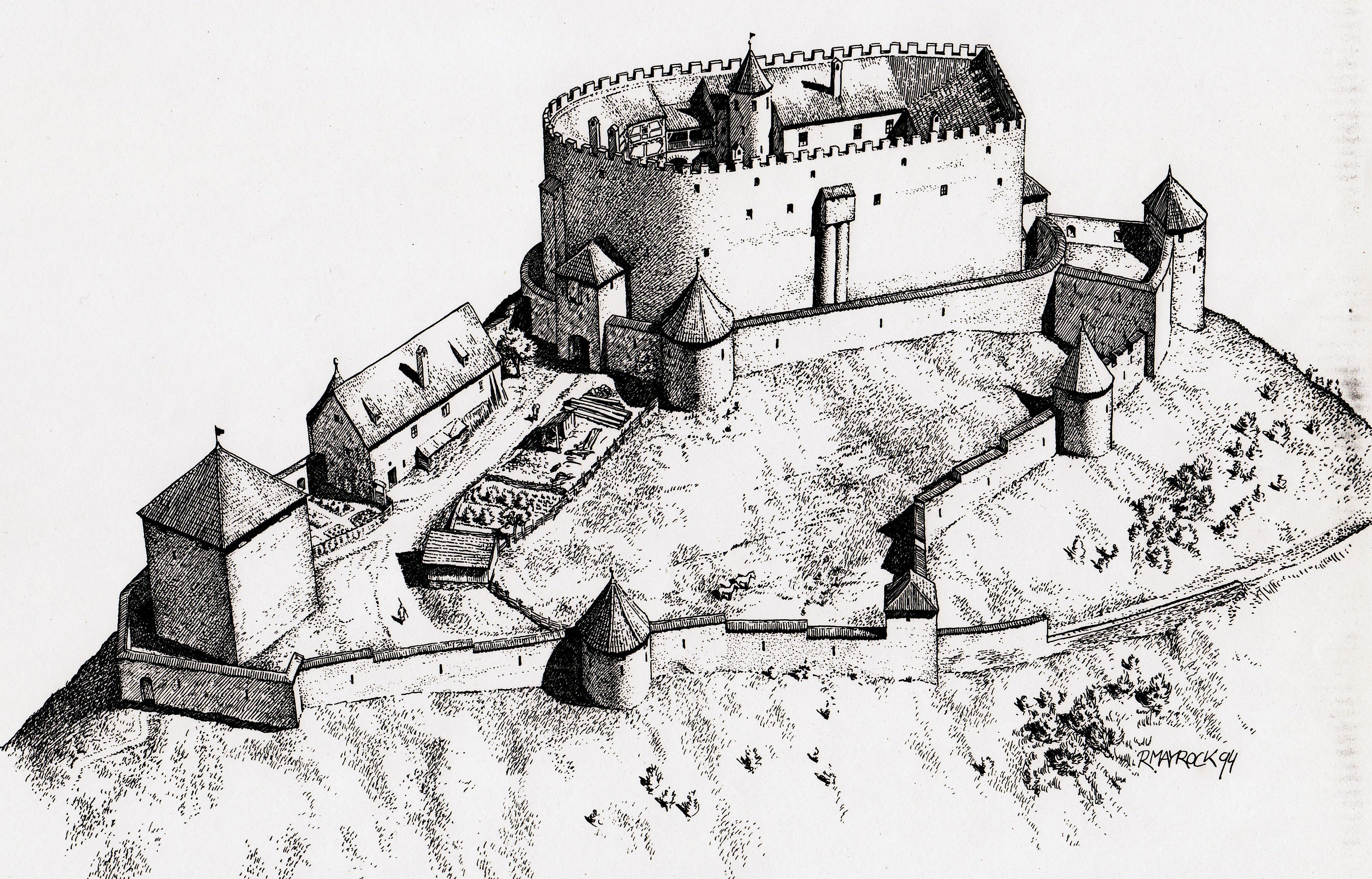 Rekonstruktion Burg Eisenberg (Ostallgäu)